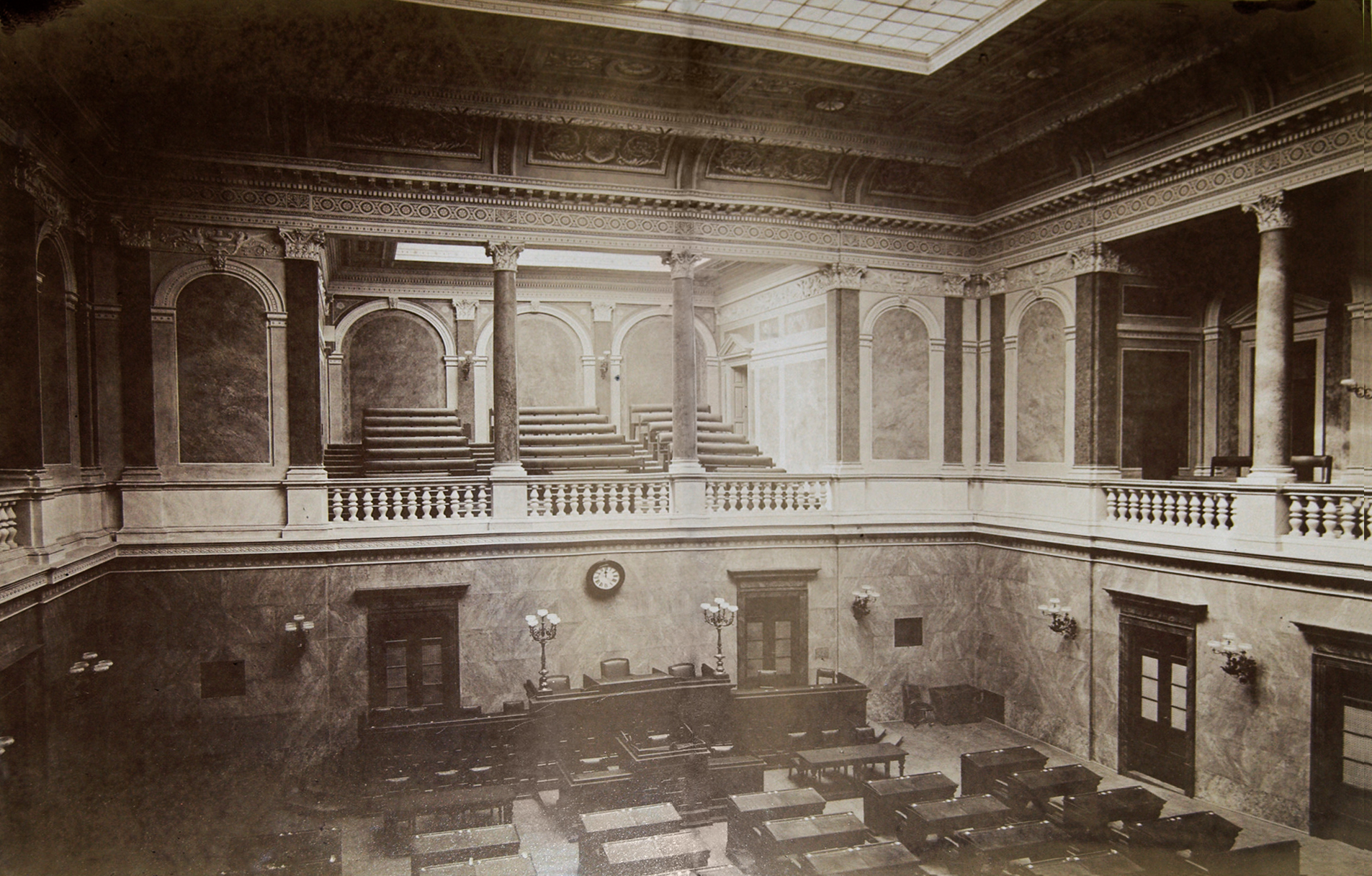 Snímek z roku 1878, zachycující pohled do Sněmovního sálu Moravské zemské sněmovny. Pořízeno při mimořádné jednodenní expozici "Zemská sněmovna v zrcadle své doby" vystavující artefakty z roku 1878, které byly nalezeny 4. listopadu 2014 při stavebně historickém průzkumu ve schránce za závěrečným kamenem budovy Ústavního soudu, původně Moravského zemského sněmu ([1]).